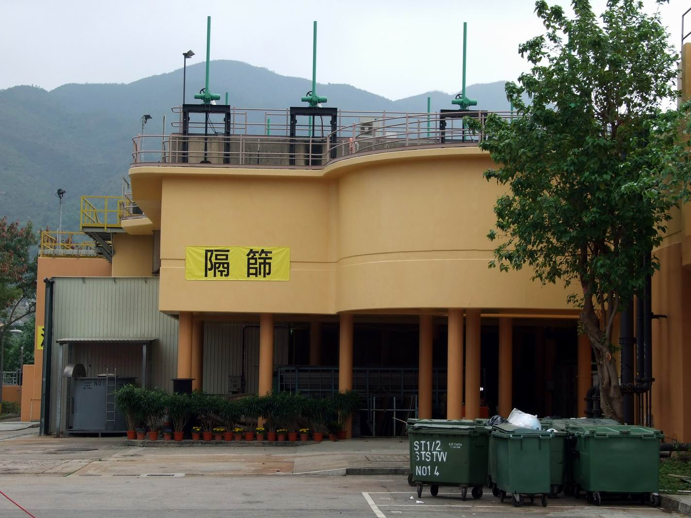 幼隔篩